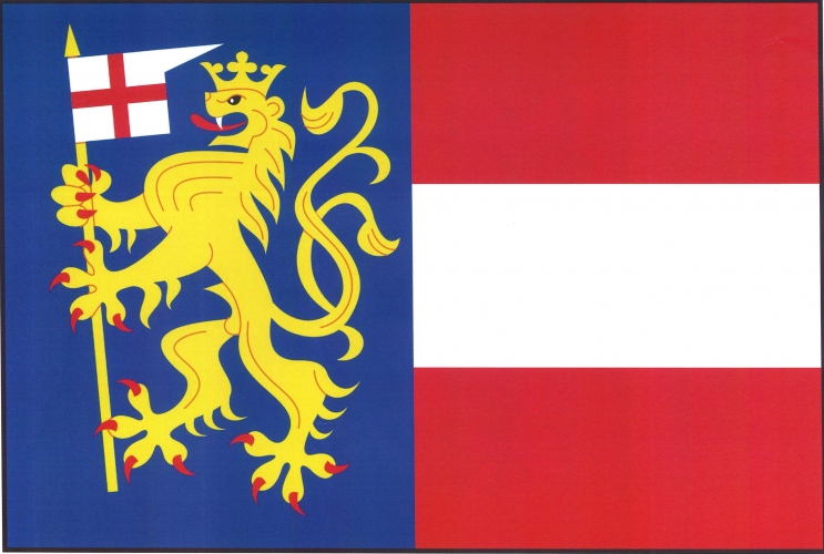 vlajka, ,Věcov okres Žďár nad Sázavou